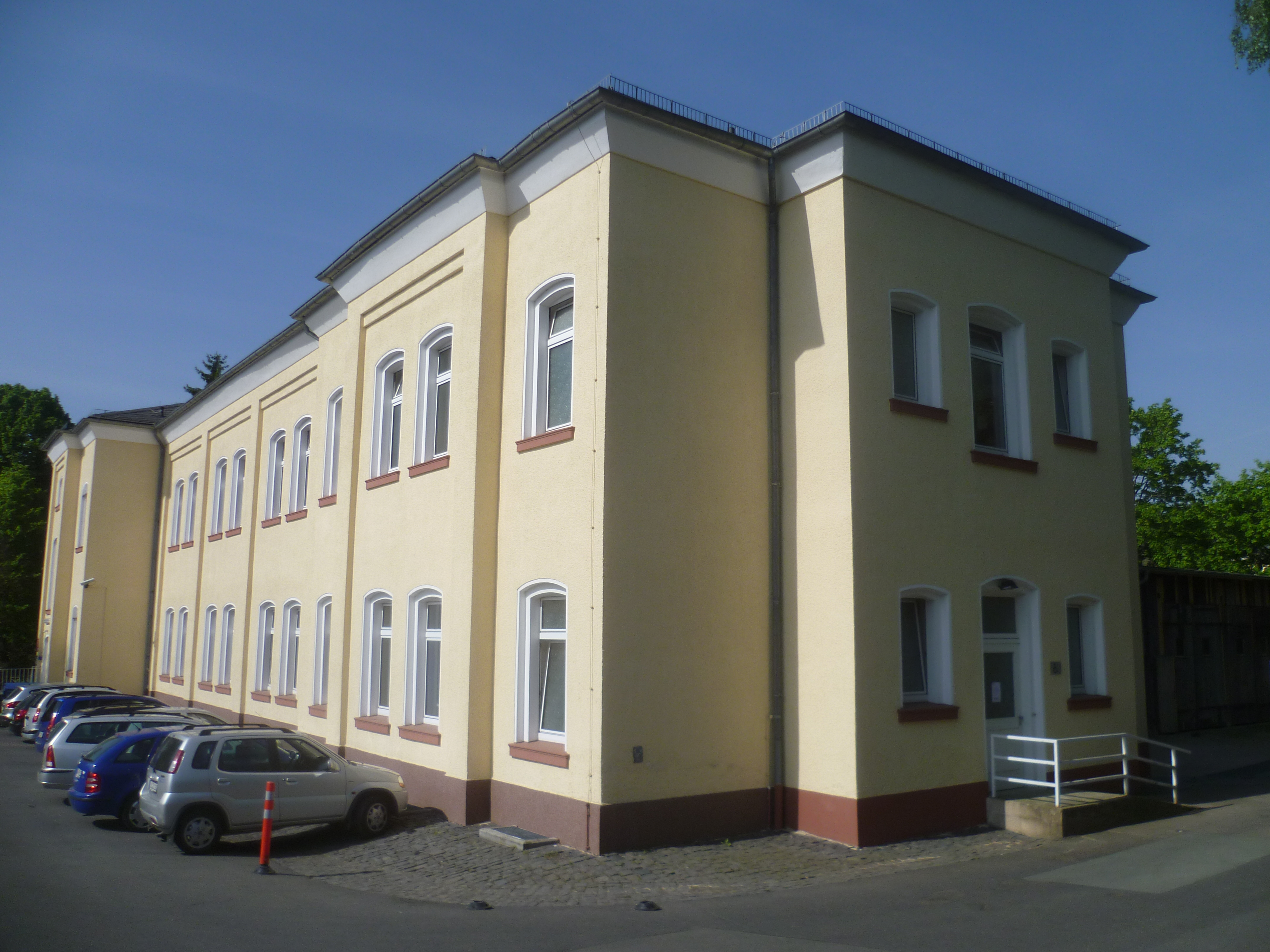 In diesem Gebäude waren Krematorien und Gaskammer in Hadamar untergebracht